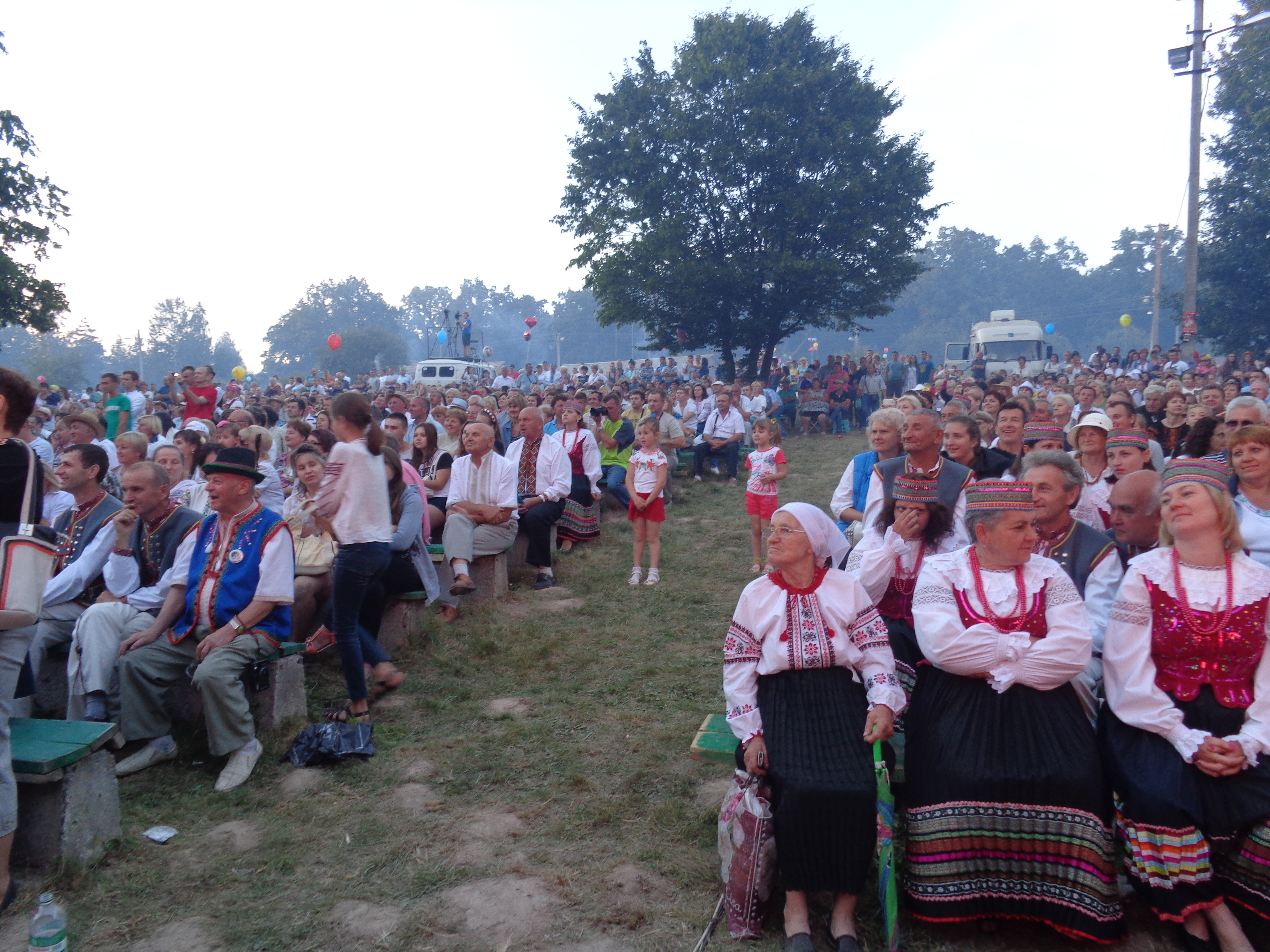 Фестиваль лемківської культури "Дзвони Лемківщини".